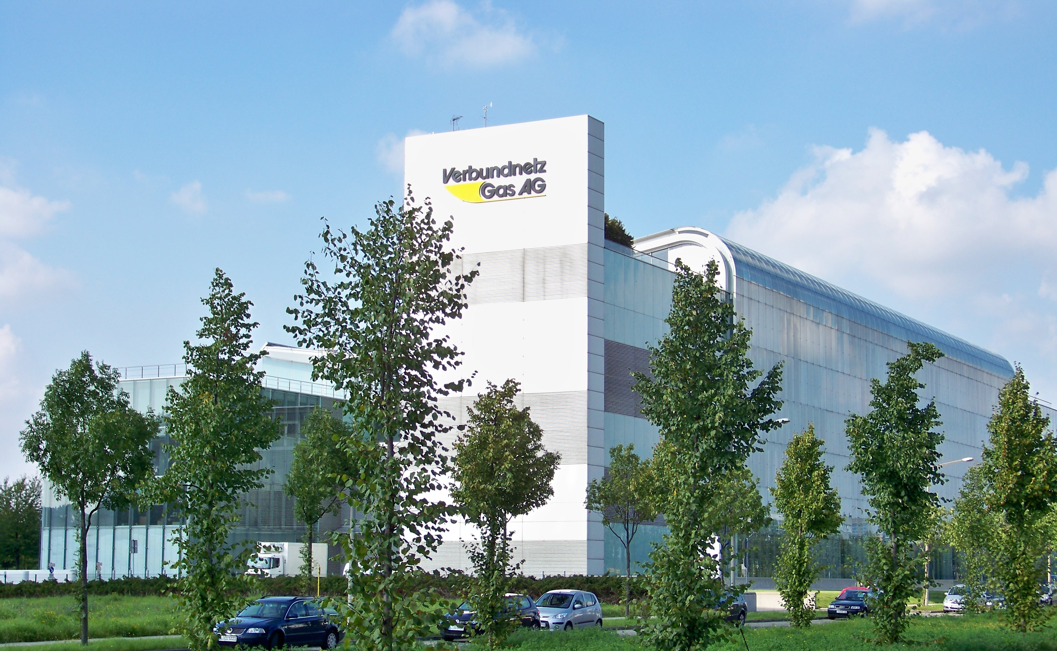 Zentrale der Vebundnetz Gas AG in der Braunstraße in Leipzig–Schönefeld-Ost